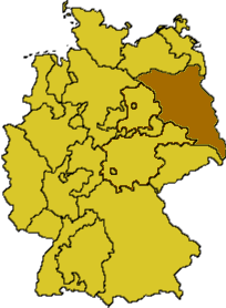 Ekd-bbso